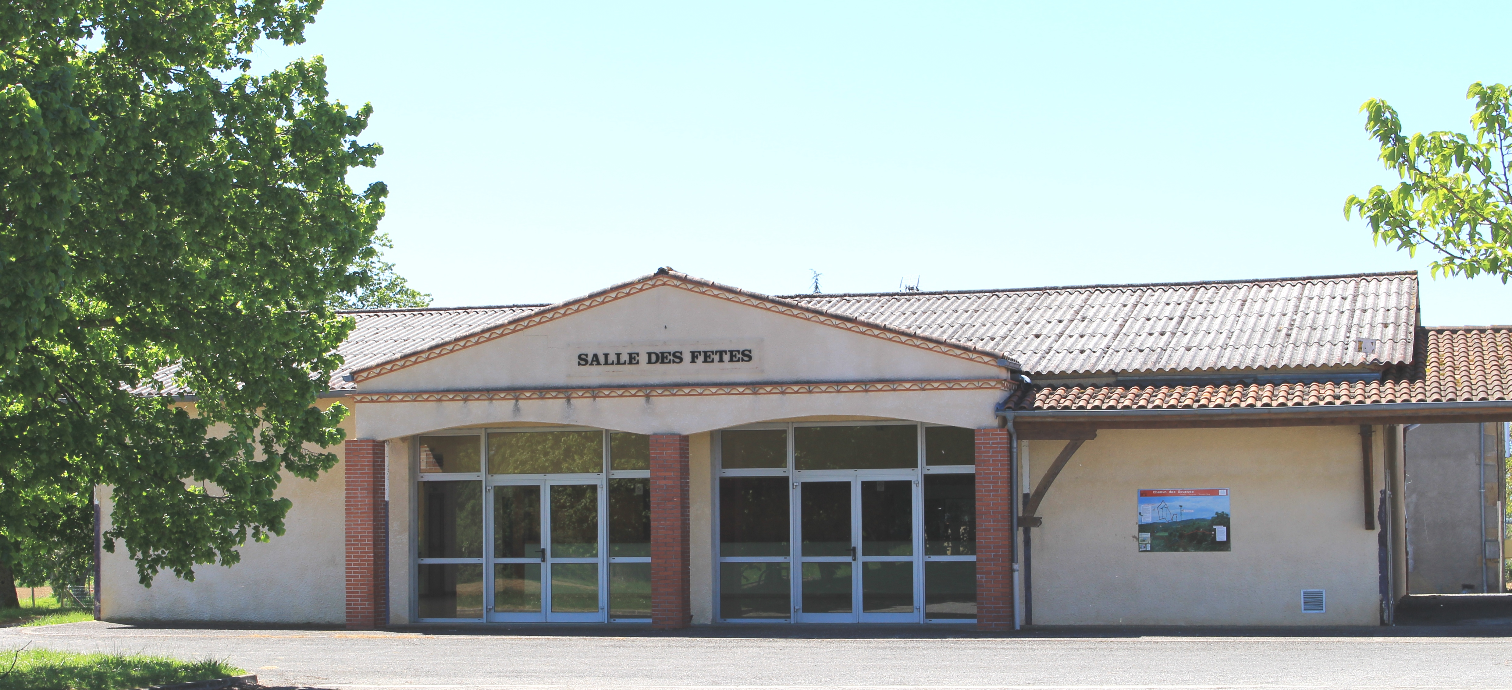 Salle des fêtes de Fontrailles (Hautes-Pyrénées)